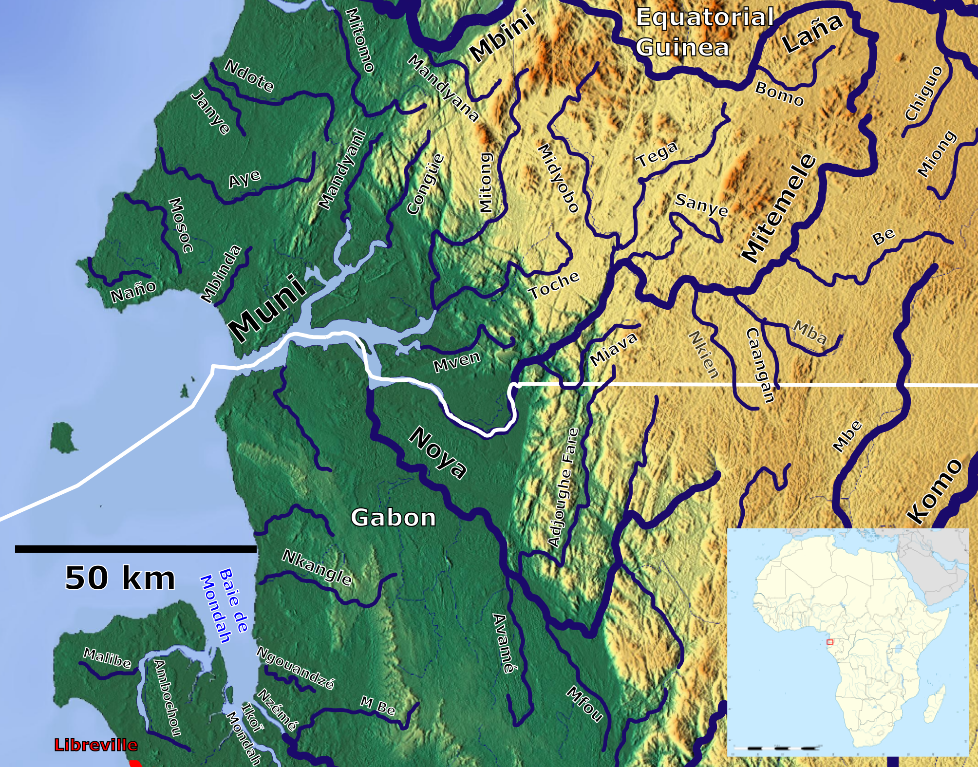 Der Muni Fluss (Ästuar) mit seinen Nebenflüssen